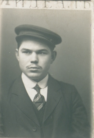 Vaimulik ja ühiskonnategelane Mihkel Laid (1899-1945)